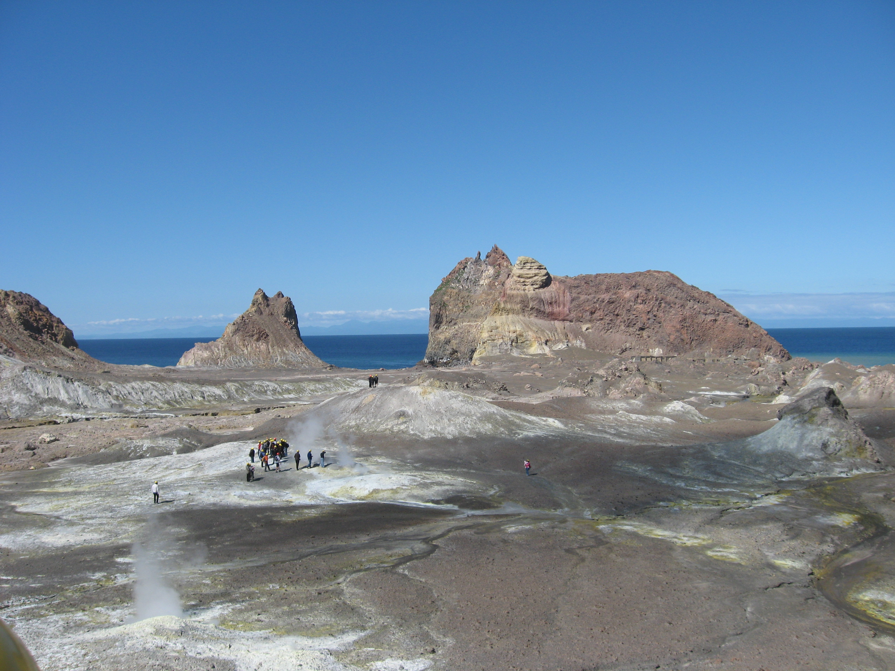 Landskaper på øya White Island som ligger 50 km fra Whakatane.